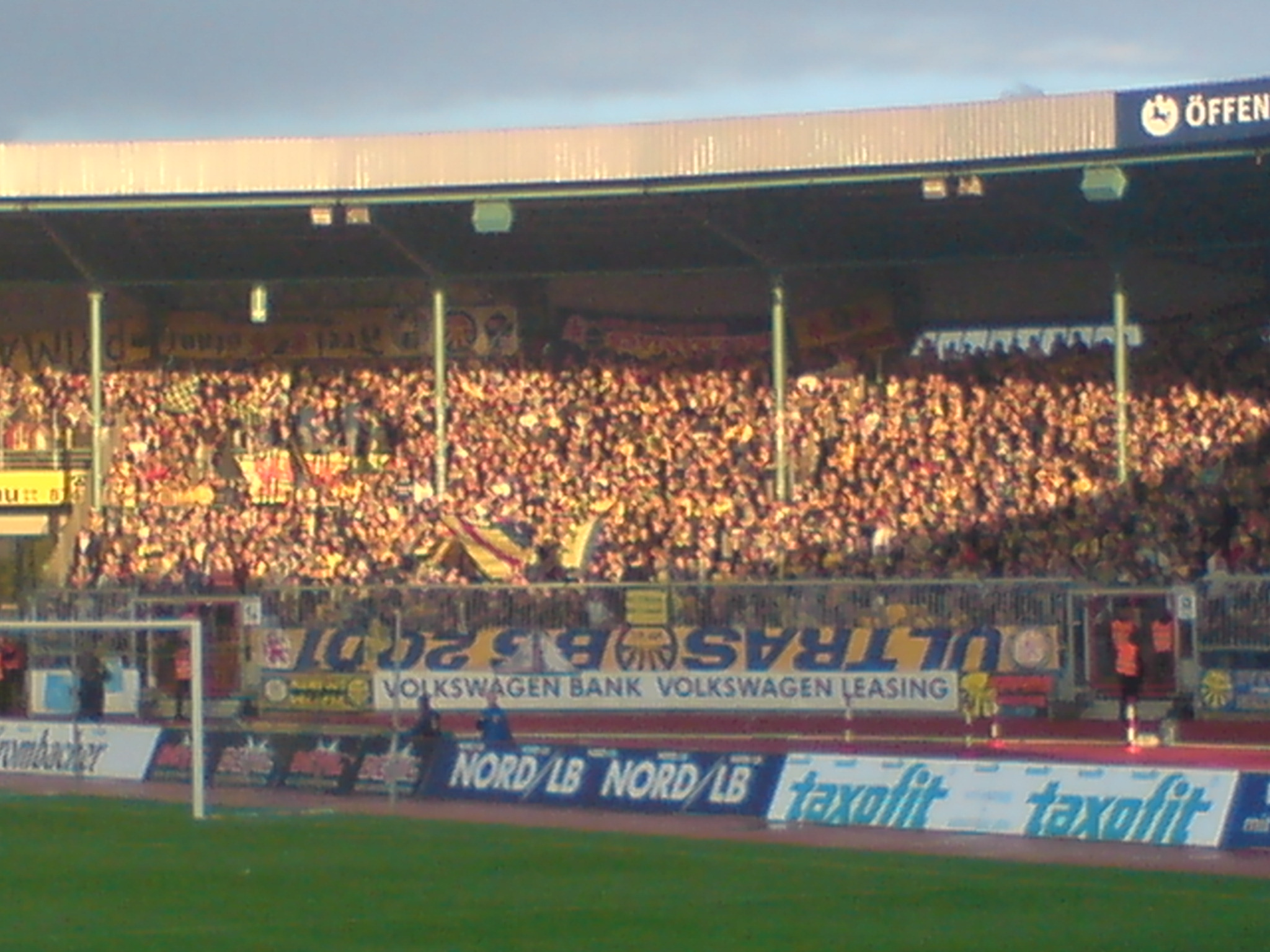 Block9 im Stadion "Hamburger Strasse"